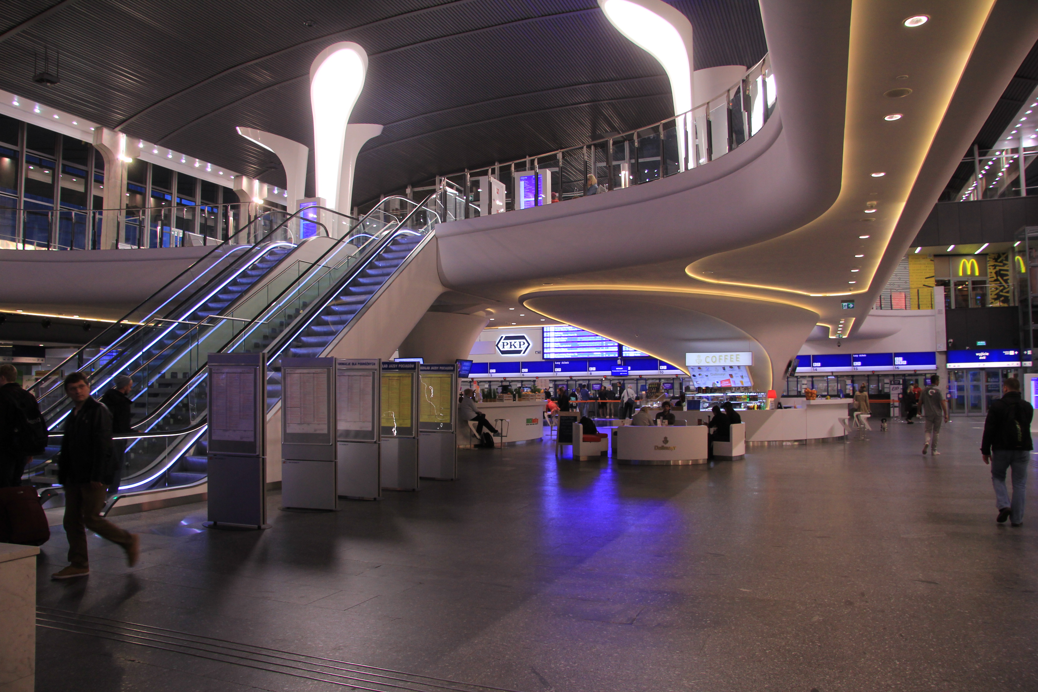 Warszawa Centralna - wnętrze